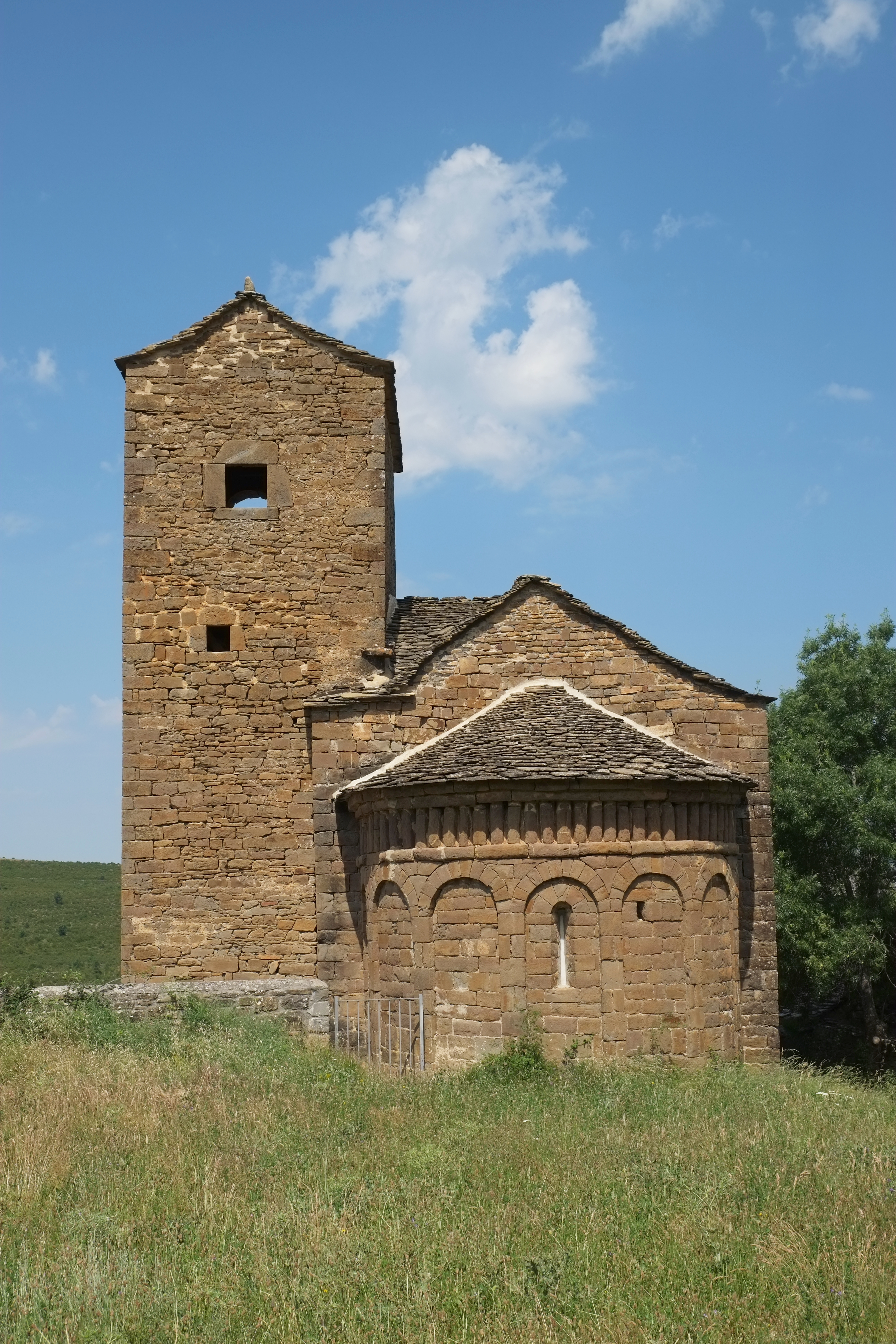 Kirche San Andrés in Satué in der Provinz Huesca in der Region Aragonien (Spanien)